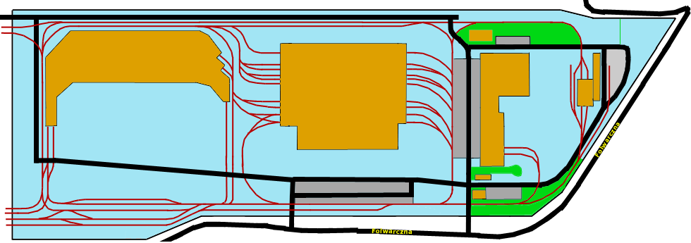 Plan zajezdni tramwajowej na Franowie w Poznaniu